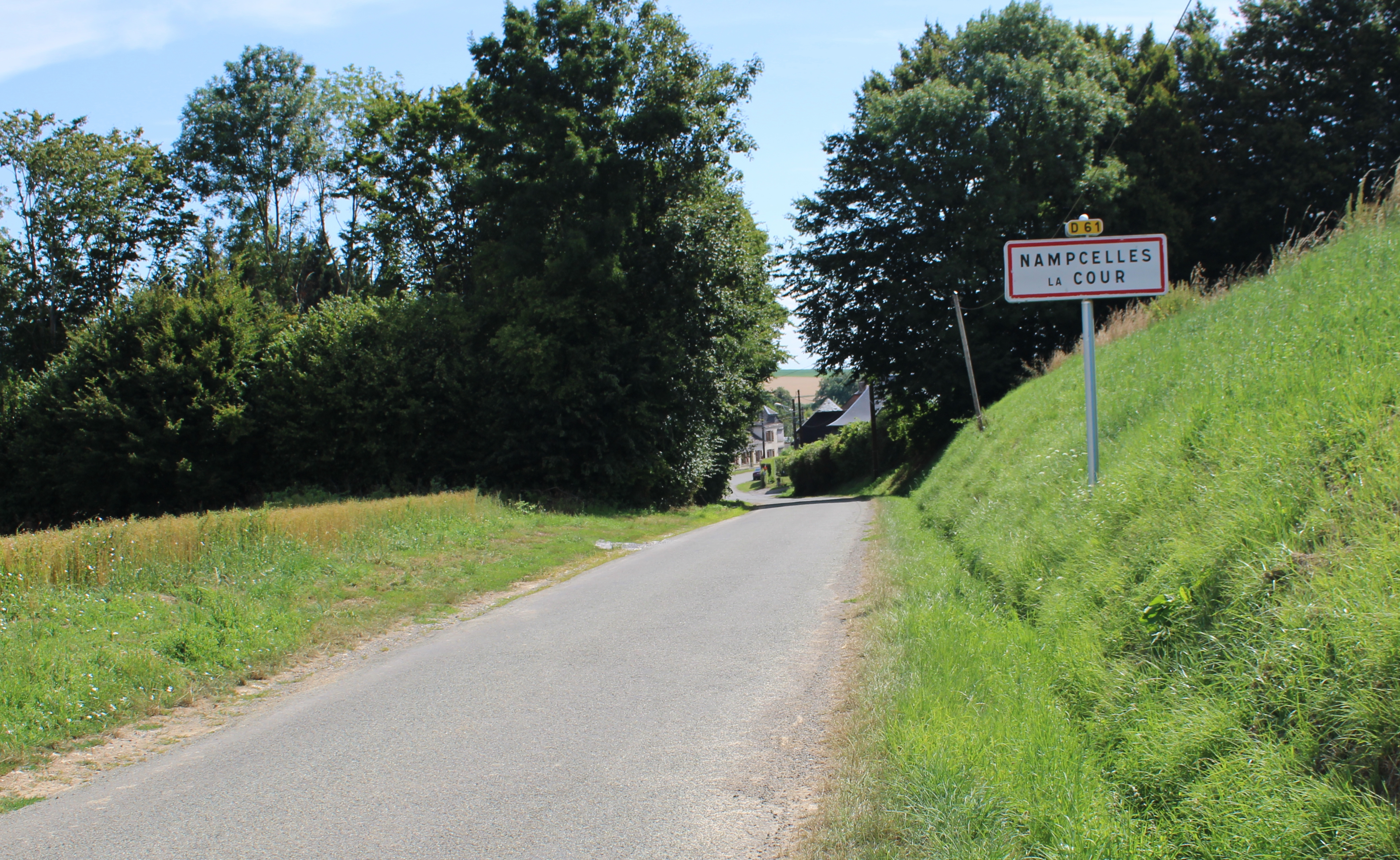 Entrée du village